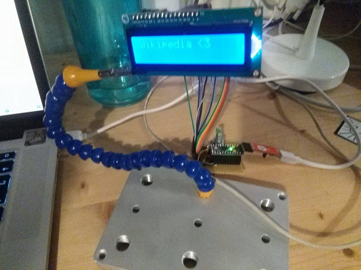 Simple création d'un hackerspace